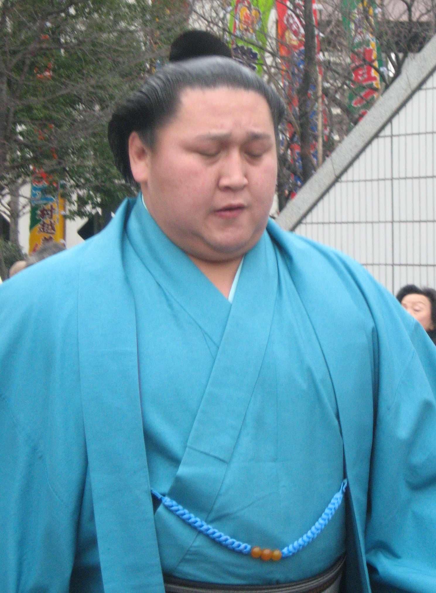 旭天鵬。平成20年1月場所にて。